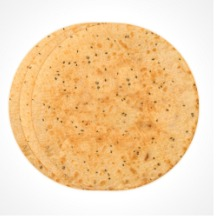 Khakhra - Indisk knäckebröd